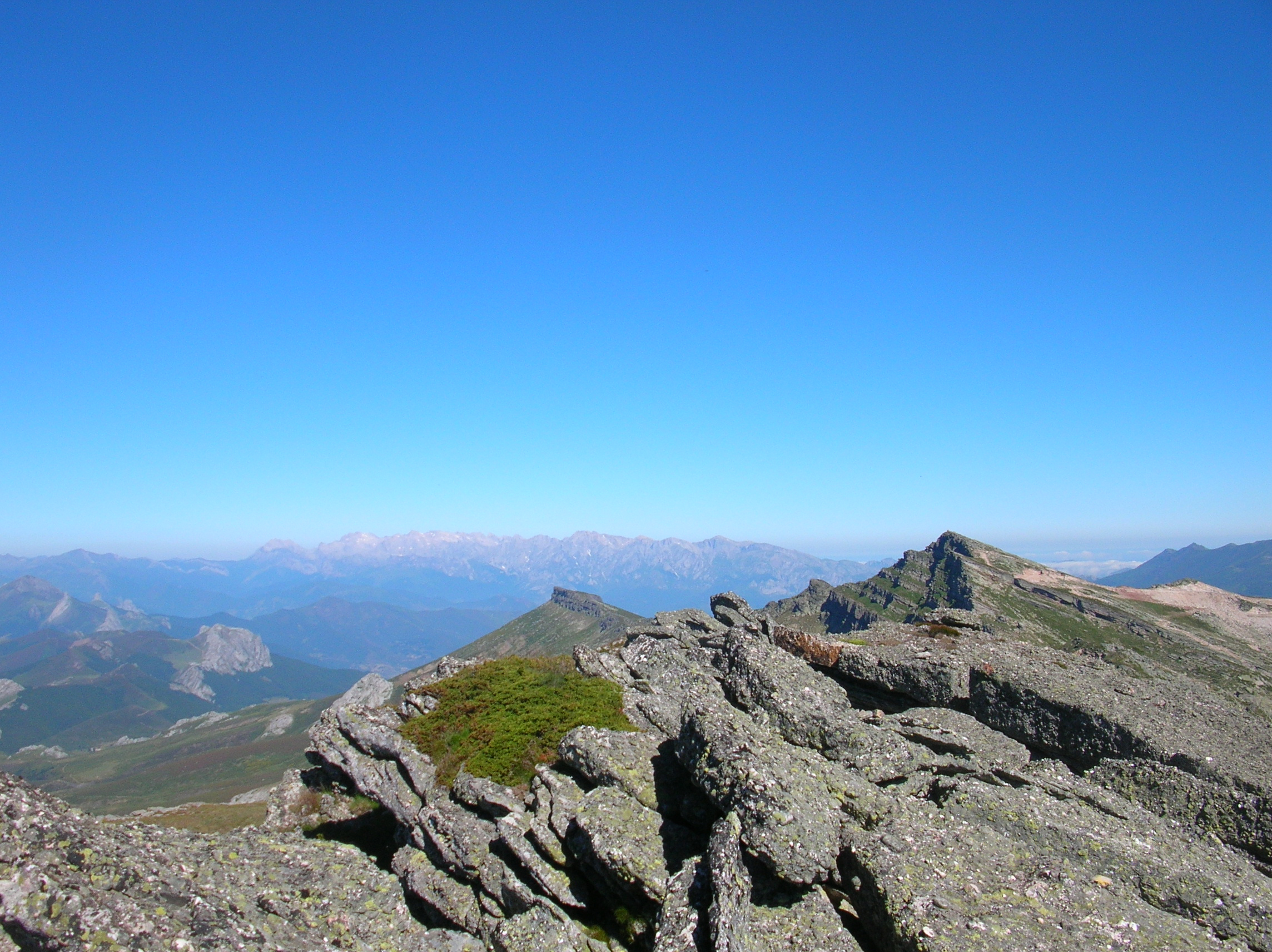 Pico Tres Mares y Peña Labra en Alto Campoo (Cantabria, España)